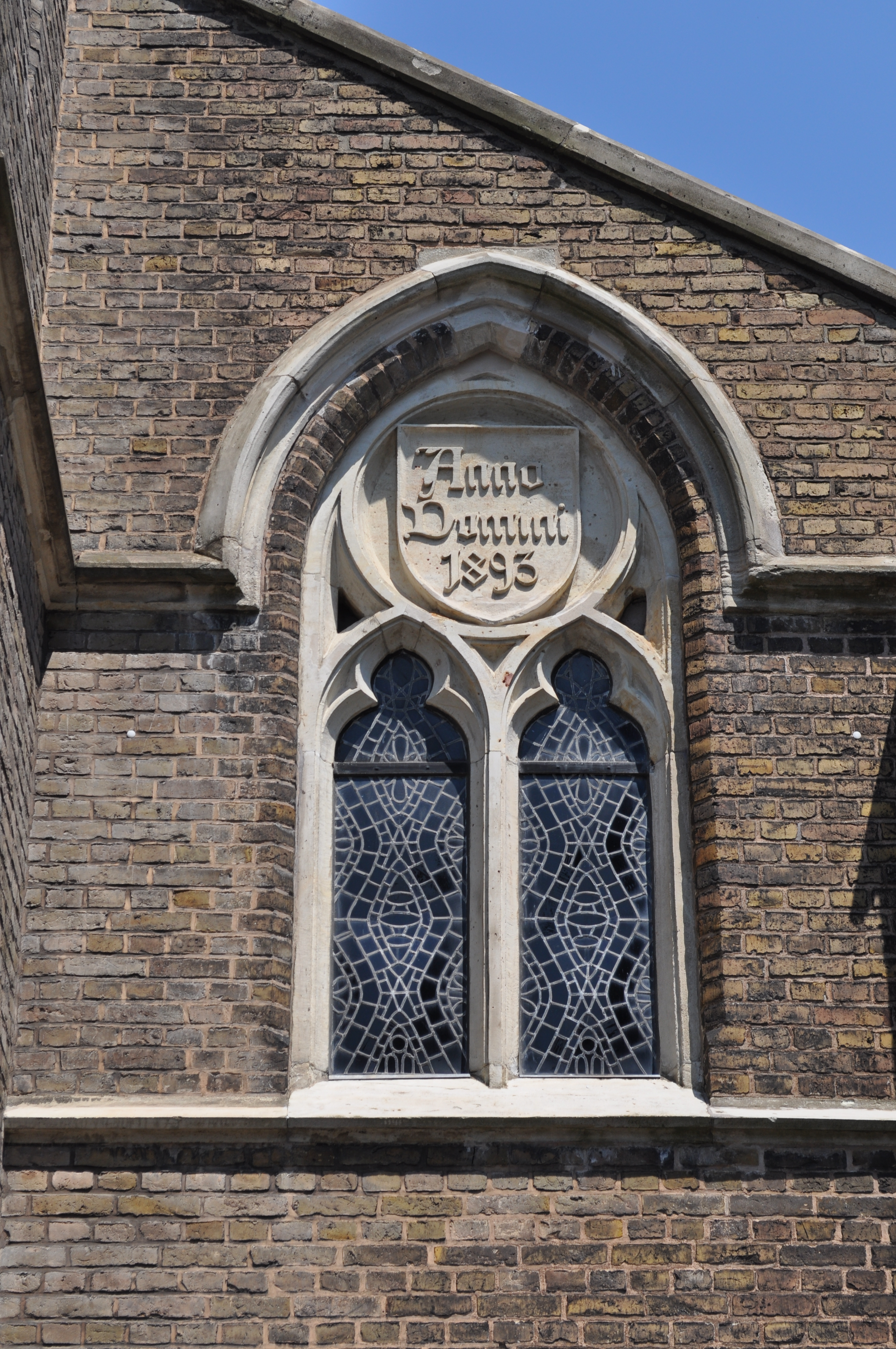 Antoniuskirche in Frankfurt am Main-Rödelheim, Detailansicht Fenster im linken Flügel